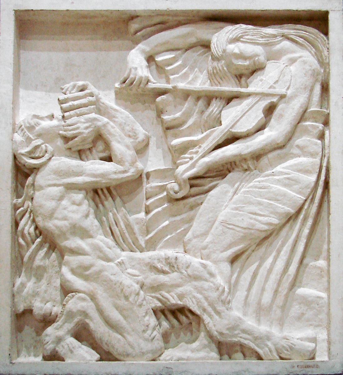 "La Musique" vers 1910 ? Antoine Bourdelle (1861-1929) Plâtre préparatoire au bas-relief (métope) réalisé pour la façade du théâtre des Champs-Elysées à Paris. Isadora Duncan a inspiré l'artiste pour représenter le personnage de droite. Musée Bourdelle